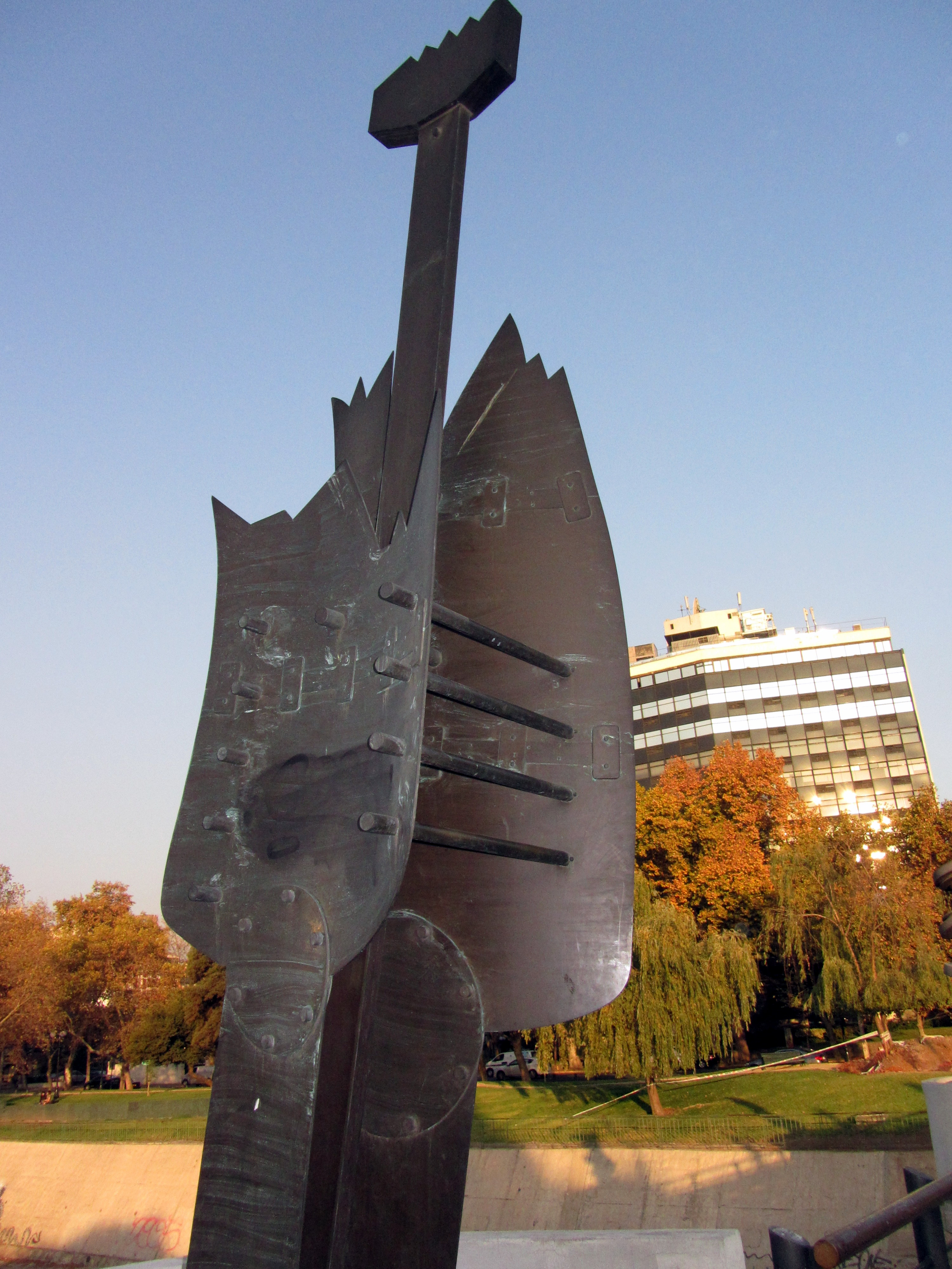 Árbol de bronce (2005), del escultor chileno Gaspar Galaz. Museo Parque de las Esculturas de Providencia